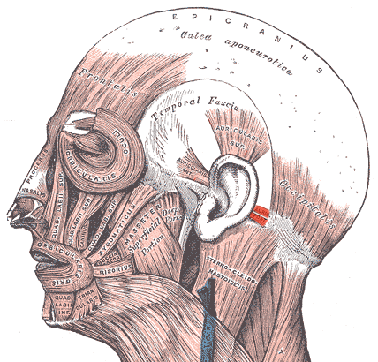 Auricularis posterior muscle